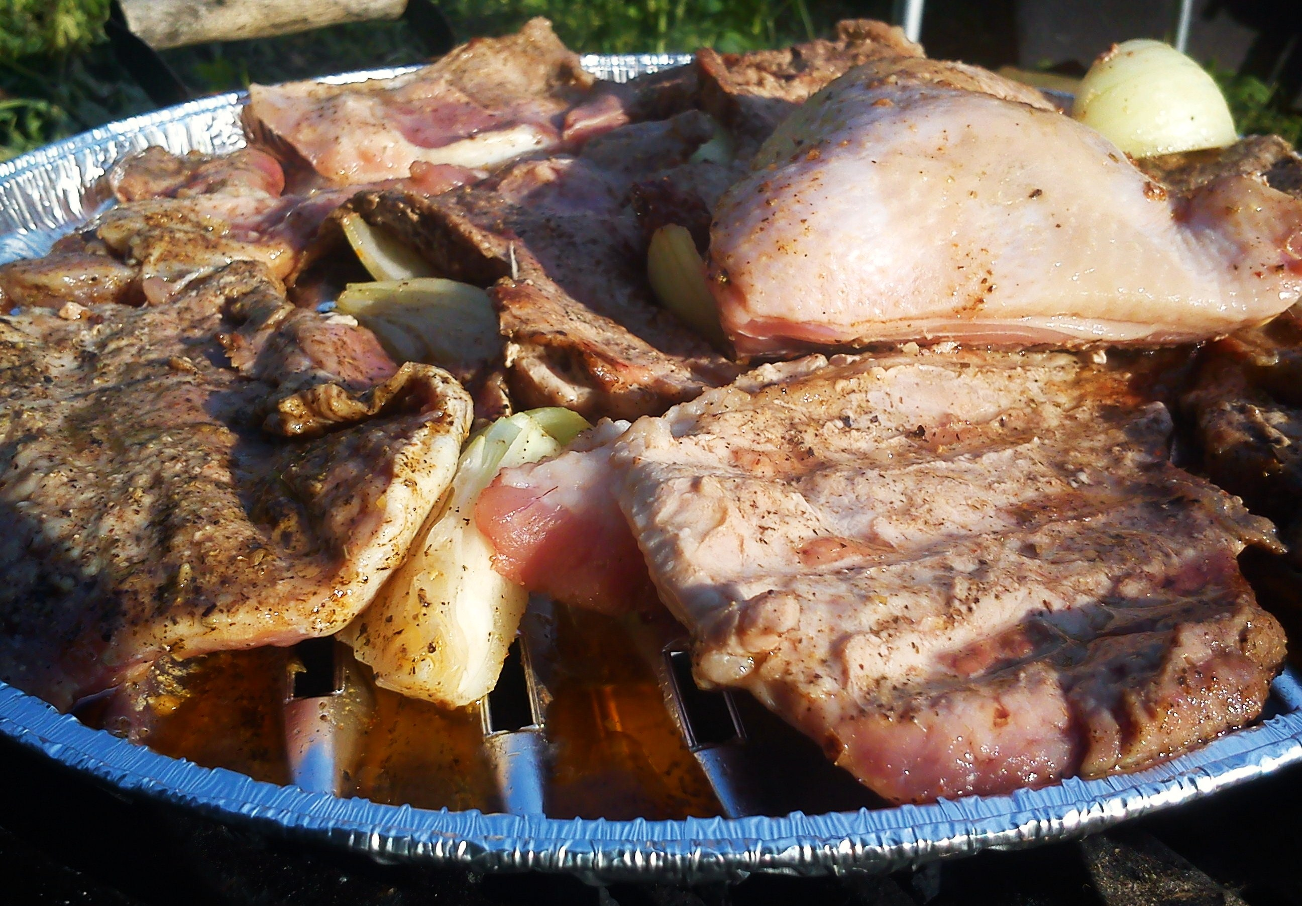 Przygotowania do grilla w Poznaniu.